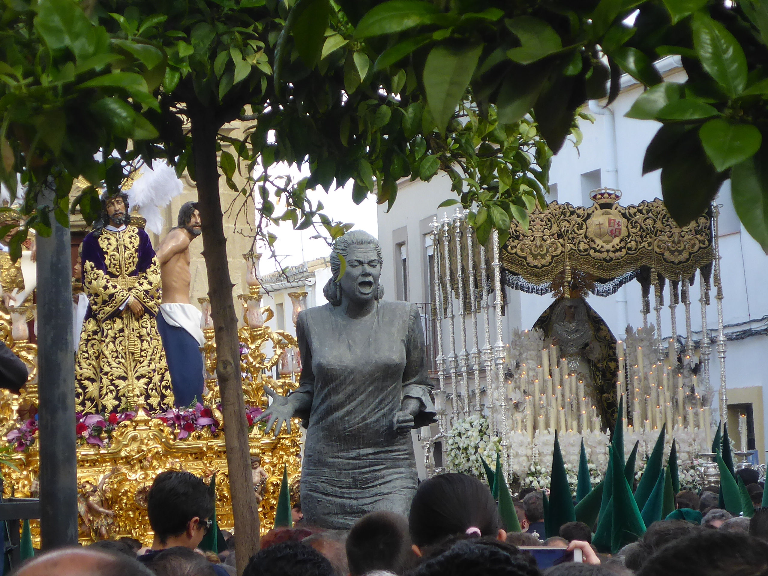 Hermandad de la Yedra (Jerez)